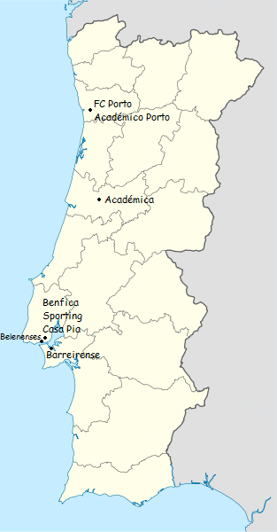 carte des clubs participants au championnat du portugal de football de première division 1938-1939